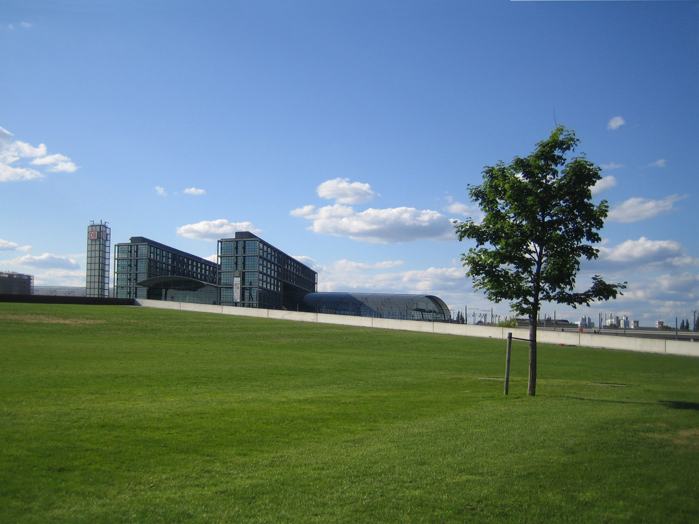 Hauptbahnhof Berlin, Blick von Südosten.